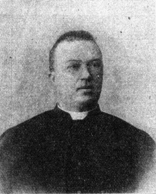 Österreichischer Politiker, Reichsratswahl 1907, Name siehe Dateiname